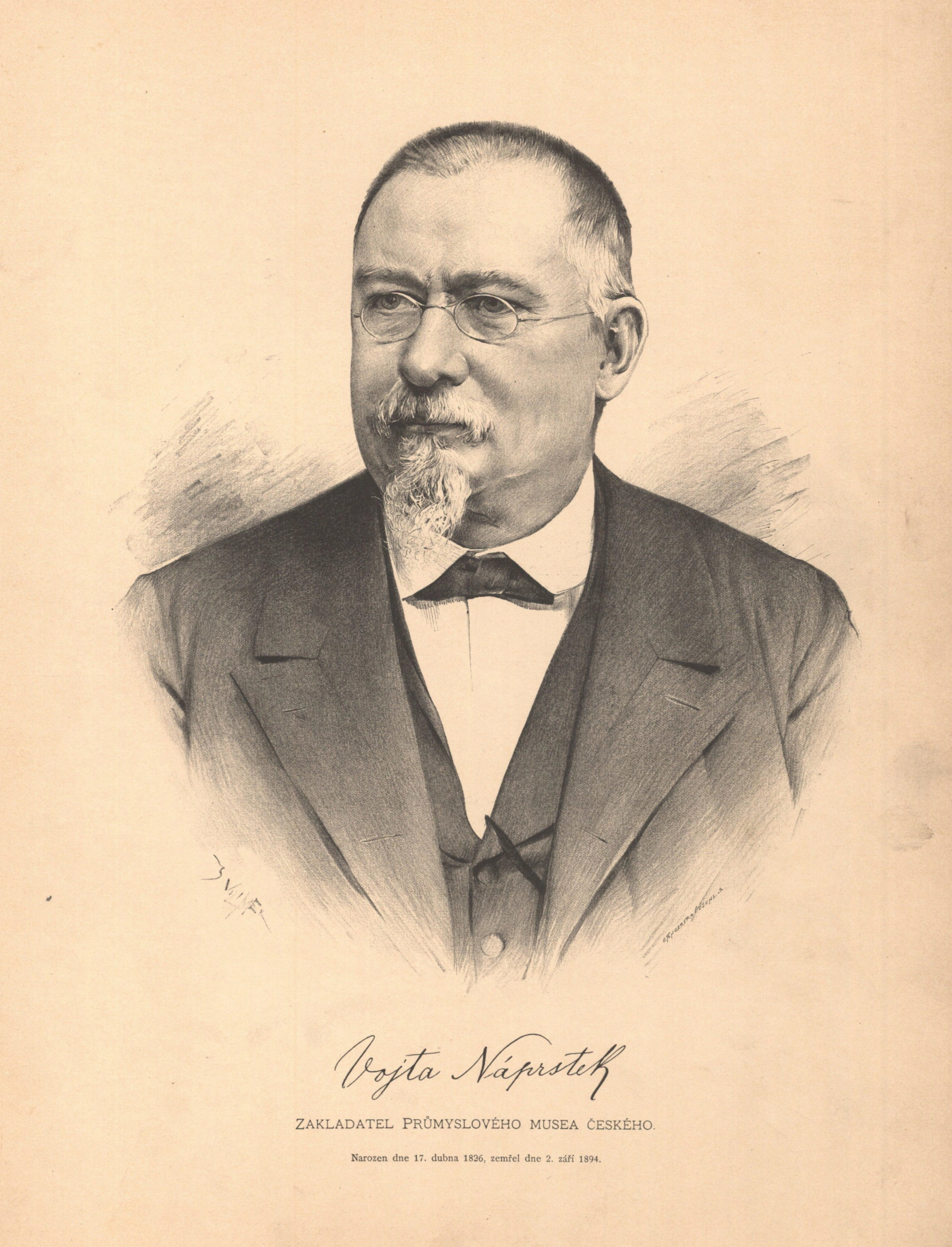 Vojtěch Náprstek (1826 - 1894), vlastenec a etnograf. Portréty českých osobností od Jana Vilímka